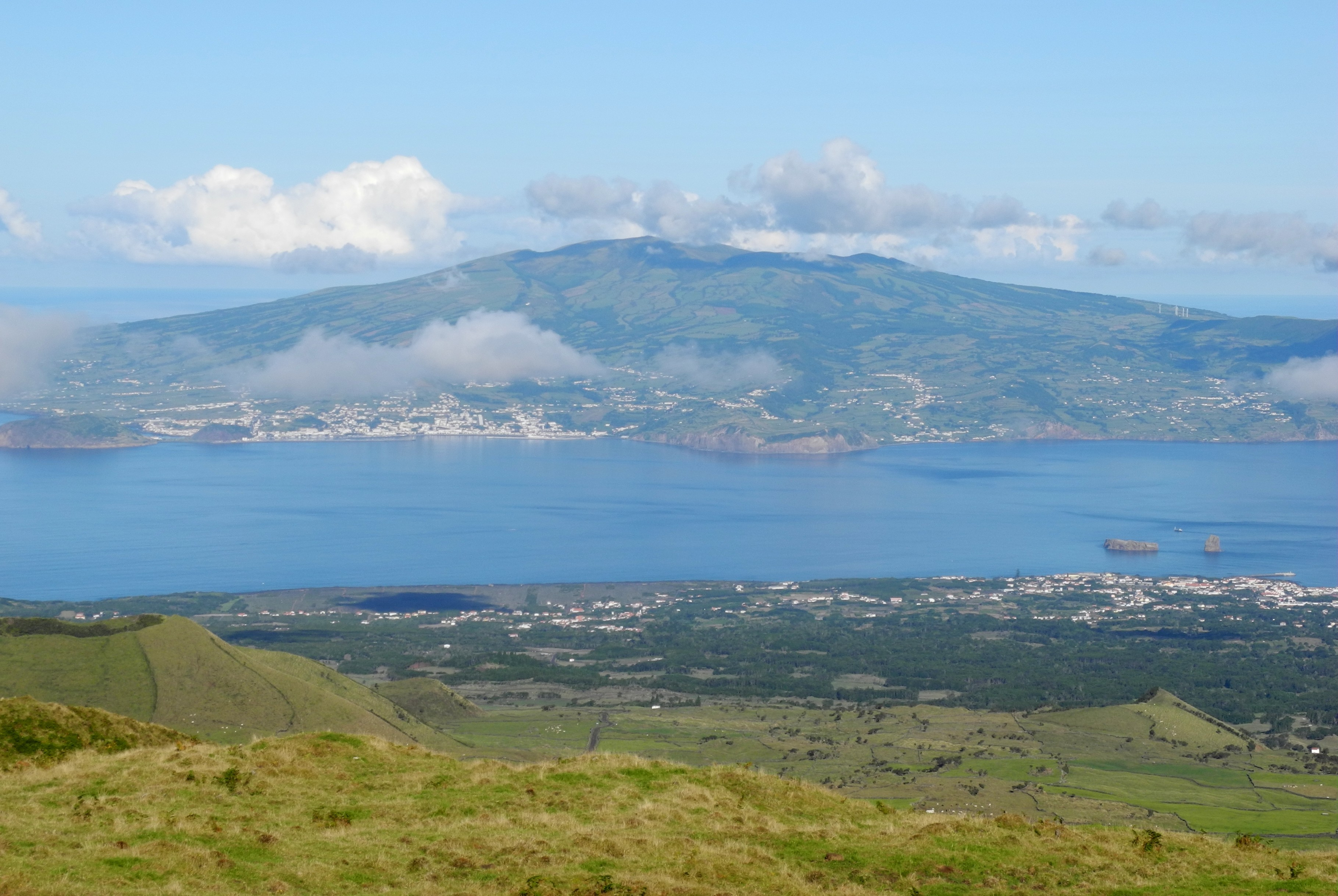 Madalena - Sicht auf Ort und Horta auf der Insel Faial